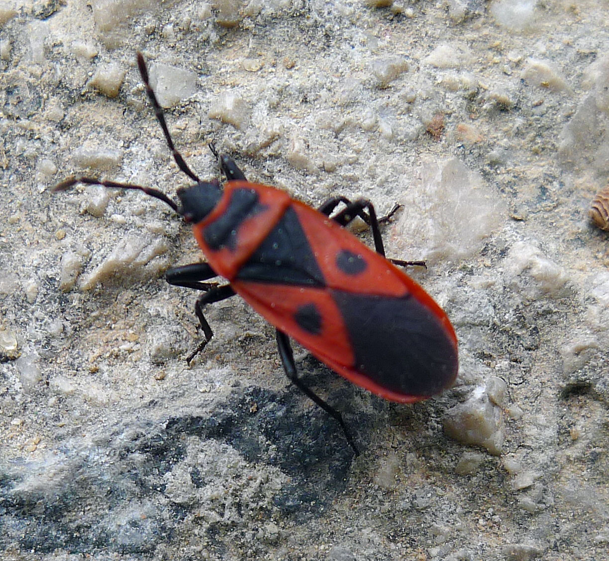 Scantius aegyptius. Pyrrhocoridae.